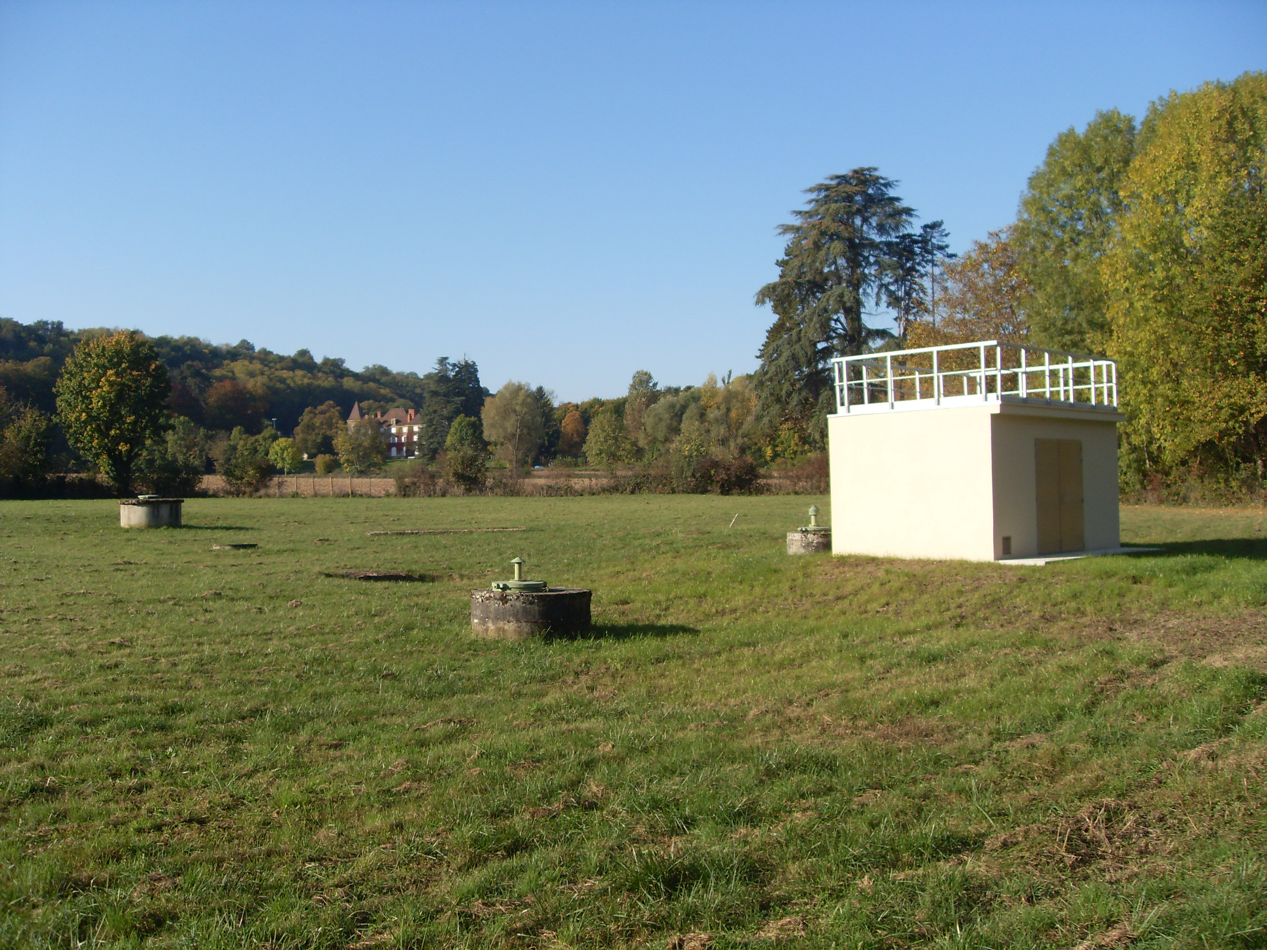 Station de pompage - Stade de la Prairie à Villefontaine (Isère)